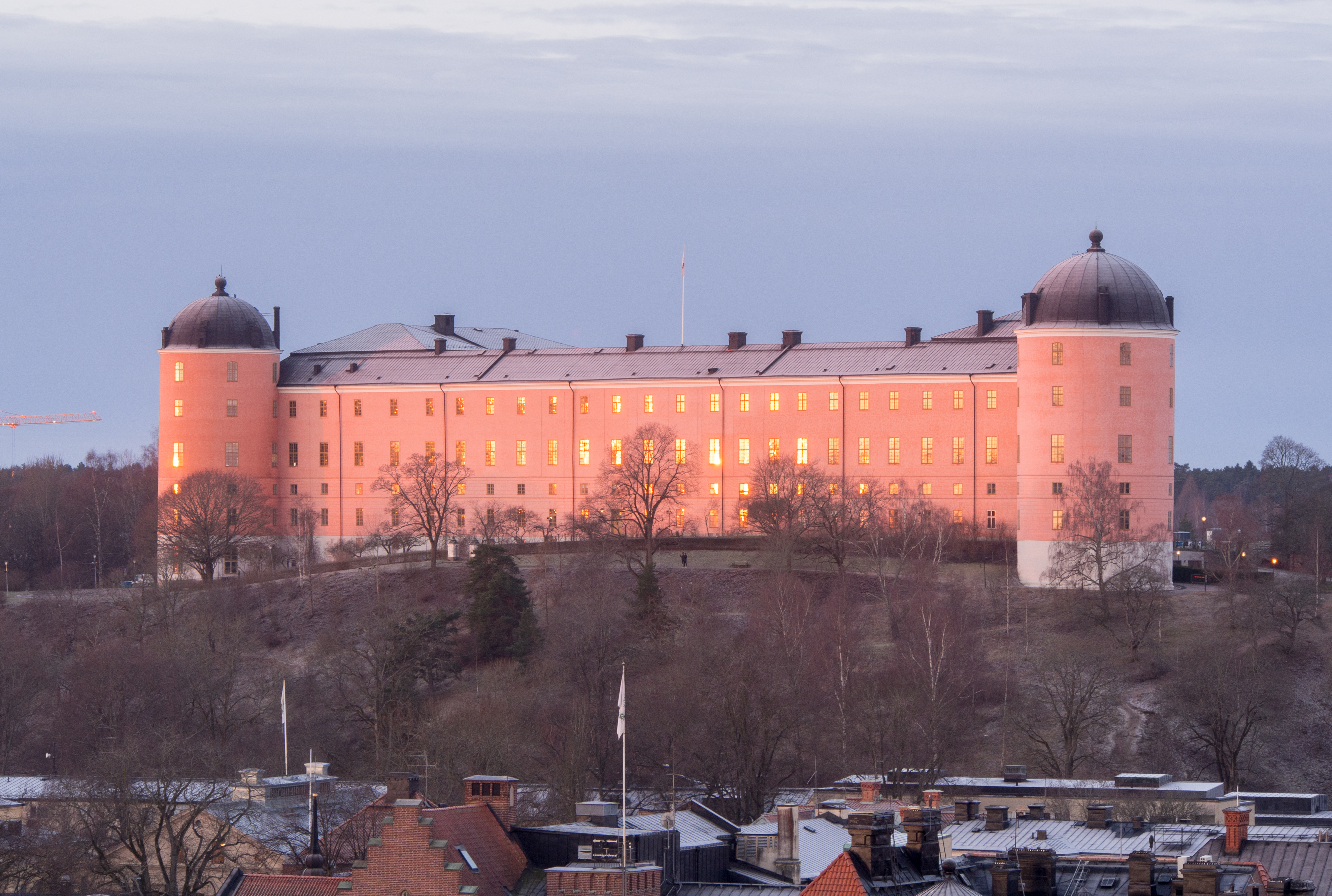 Uppsala slott (Fjärdingen 33:1) Uppsala slott sedd från en av stans byggkranar.